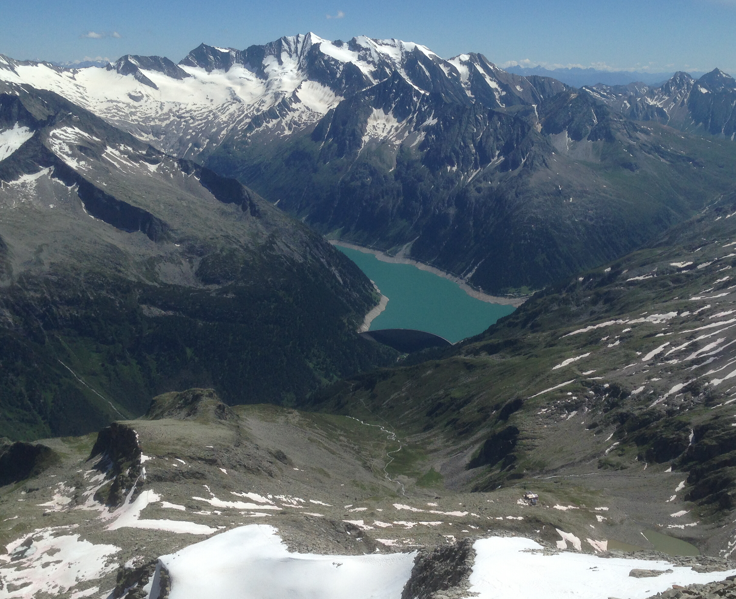 Lage des Friesenberghauses (vorne rechtes), in der Mitte Schlegeisspeicher, dahinter die Hochfeiler-Gruppe, vorne links das Petersköpfl